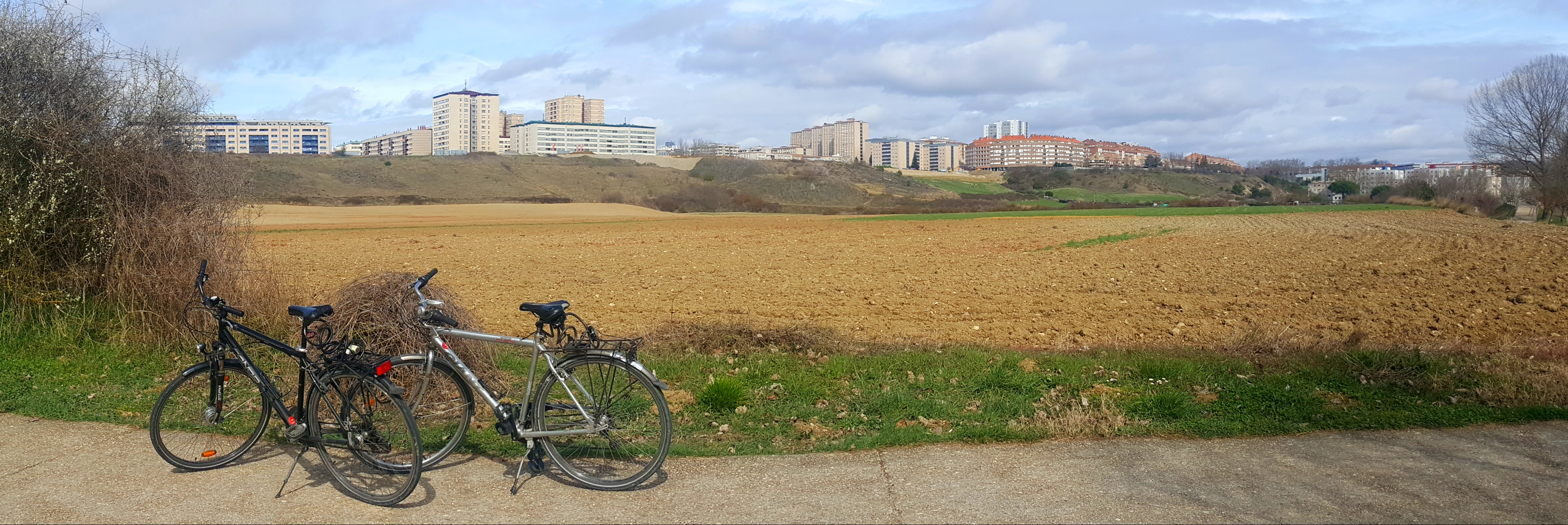 Barañain Arga parkeko bidetik